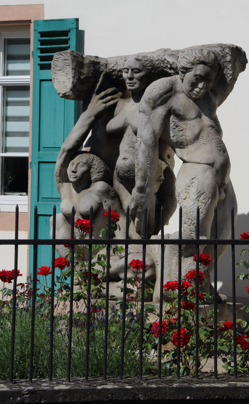 "Die vier Jahreszeiten - Dionysos" (Sandstein, 1997/98) des Künstlers Clemens M. Strugalla. Weingut Johannishof, Johannisberg im Rheingau.